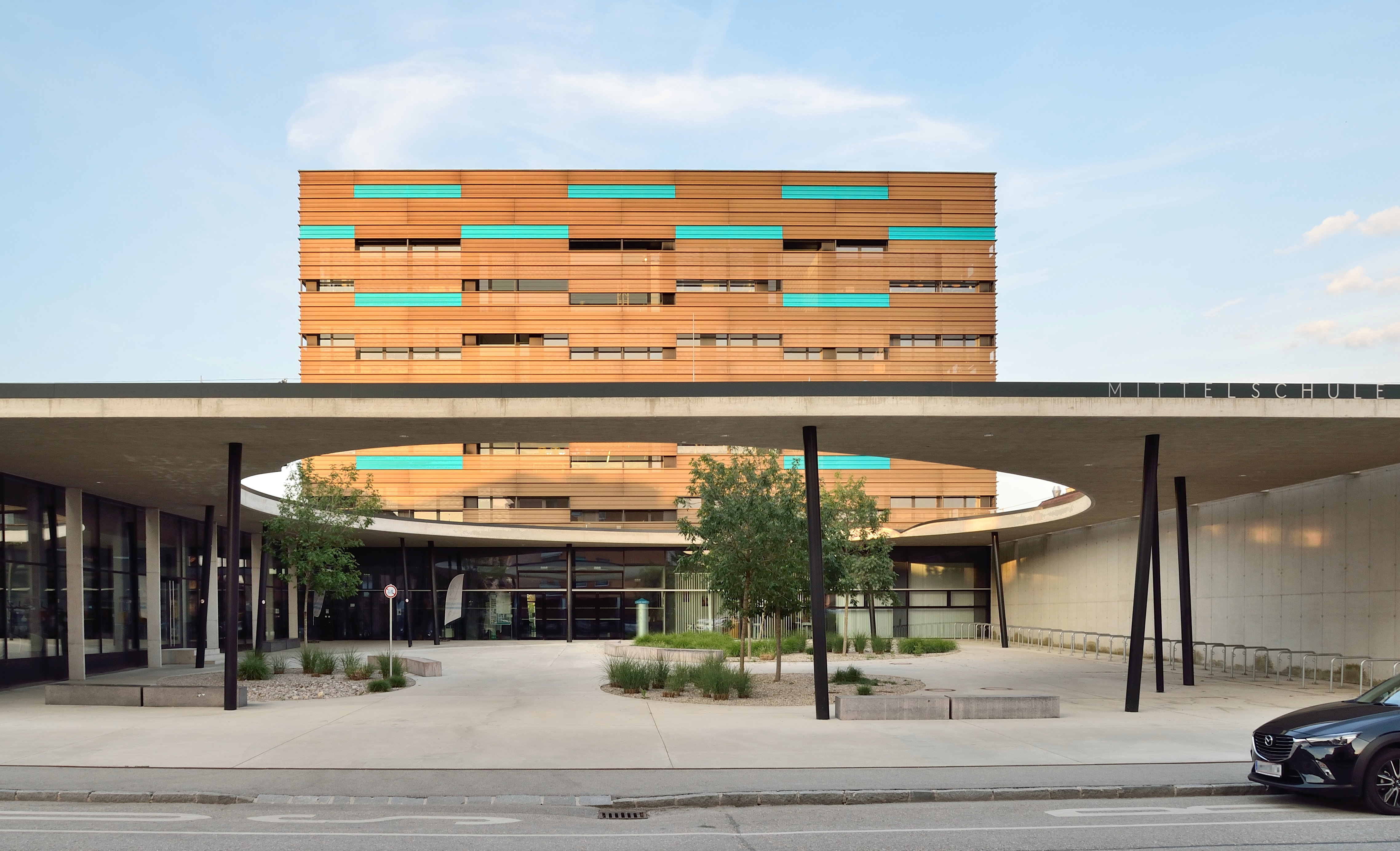 Der Schulkomplex der Mittelschule Amstetten Ecke Pestalozzistraße / Stefan-Fadinger-Straße in Amstetten. Anschließend befindet sich an der Ostseite die Musikschule der Stadt Amstetten. Die Fassade ist mit türkisen und braunen Elementen verkleidet.